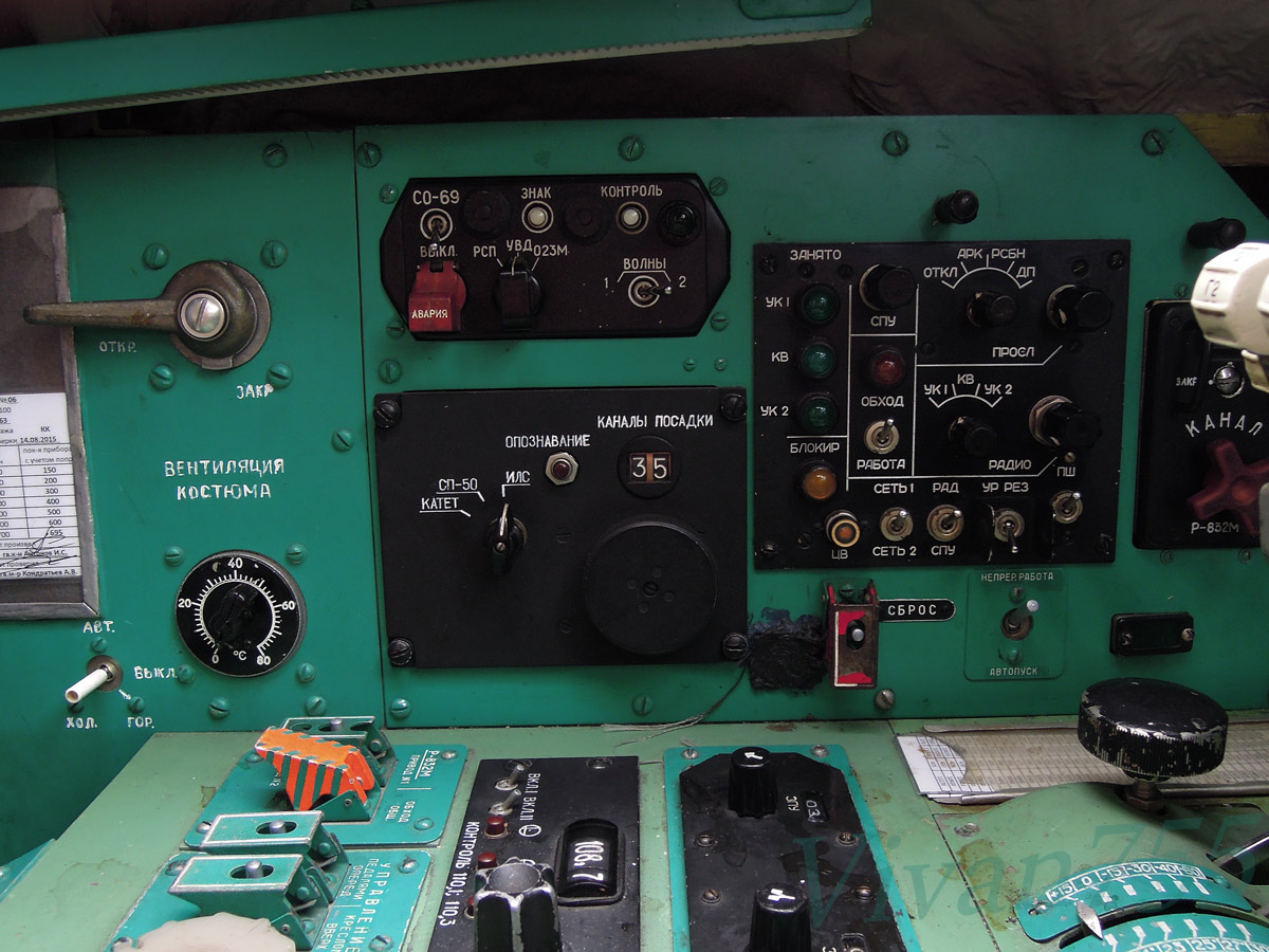 Пульт самолётного ответчика, абонентский аппарат СПУ и другие приборы на левом борту кабины самолёта Ту-142МК